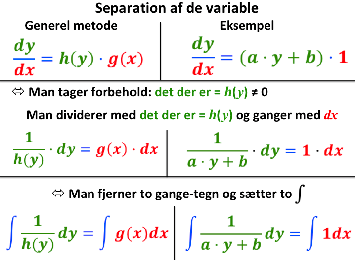 Eksemplet er en lineær differentialligning